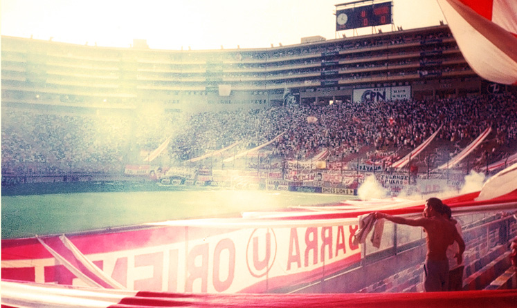 Barra Oriente del Club Universitario de Deportes del Perú.